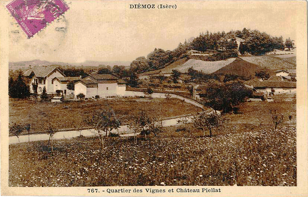 Quartier des vignes et château Piellat au début du XXe siècle à Diémoz